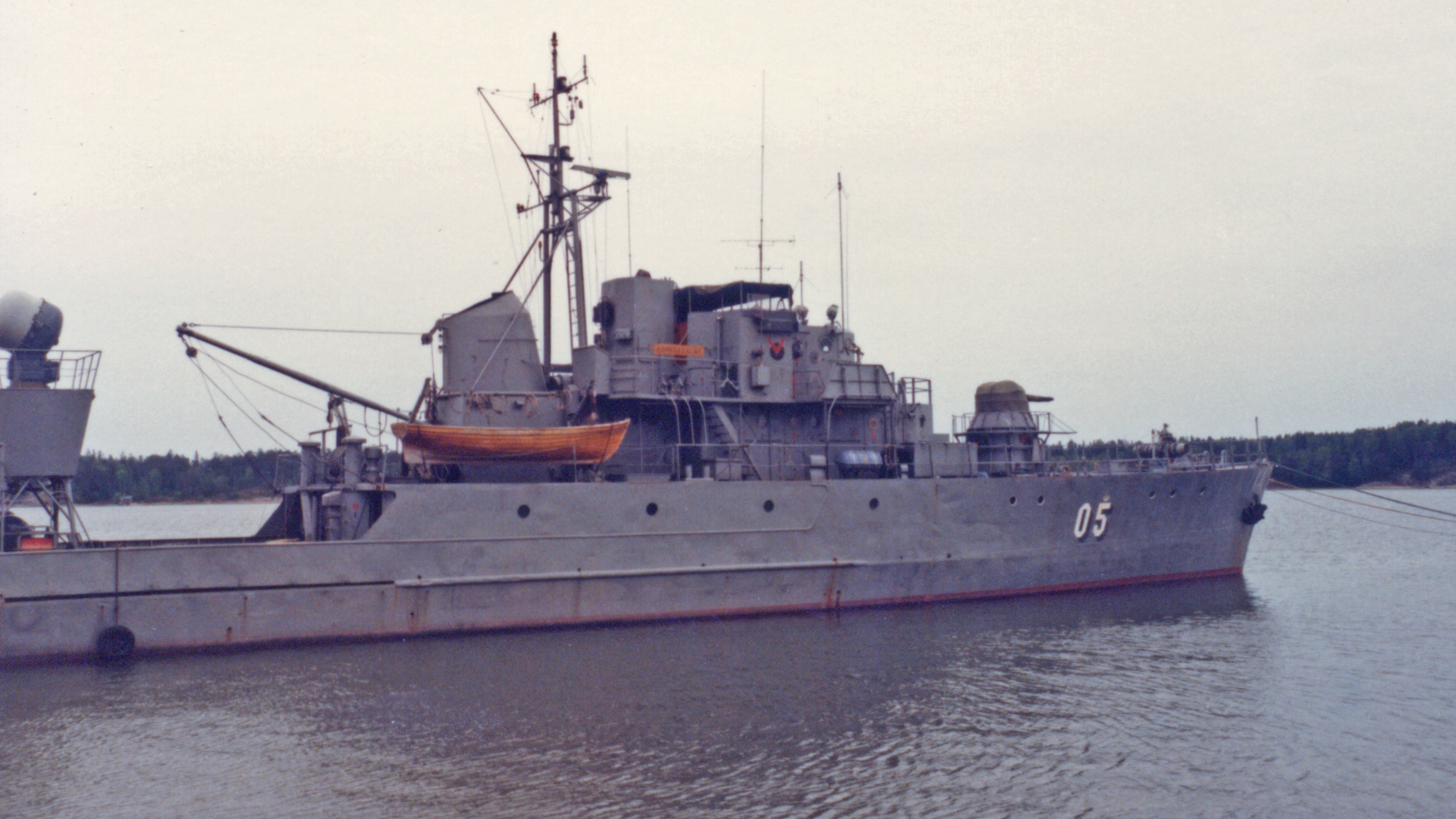 Minelayer Keihässalmi of Finnish Navy